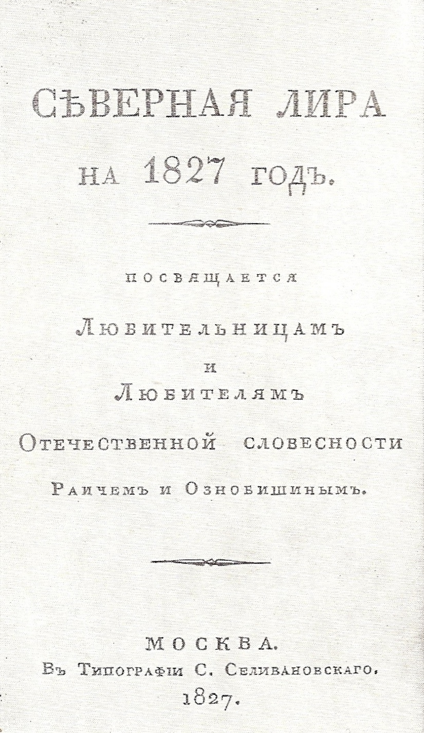 Титульный лист альманаха "Северная лира" на 1827 год. Издан С. Е. Раичем и Д. П. Ознобишиным.